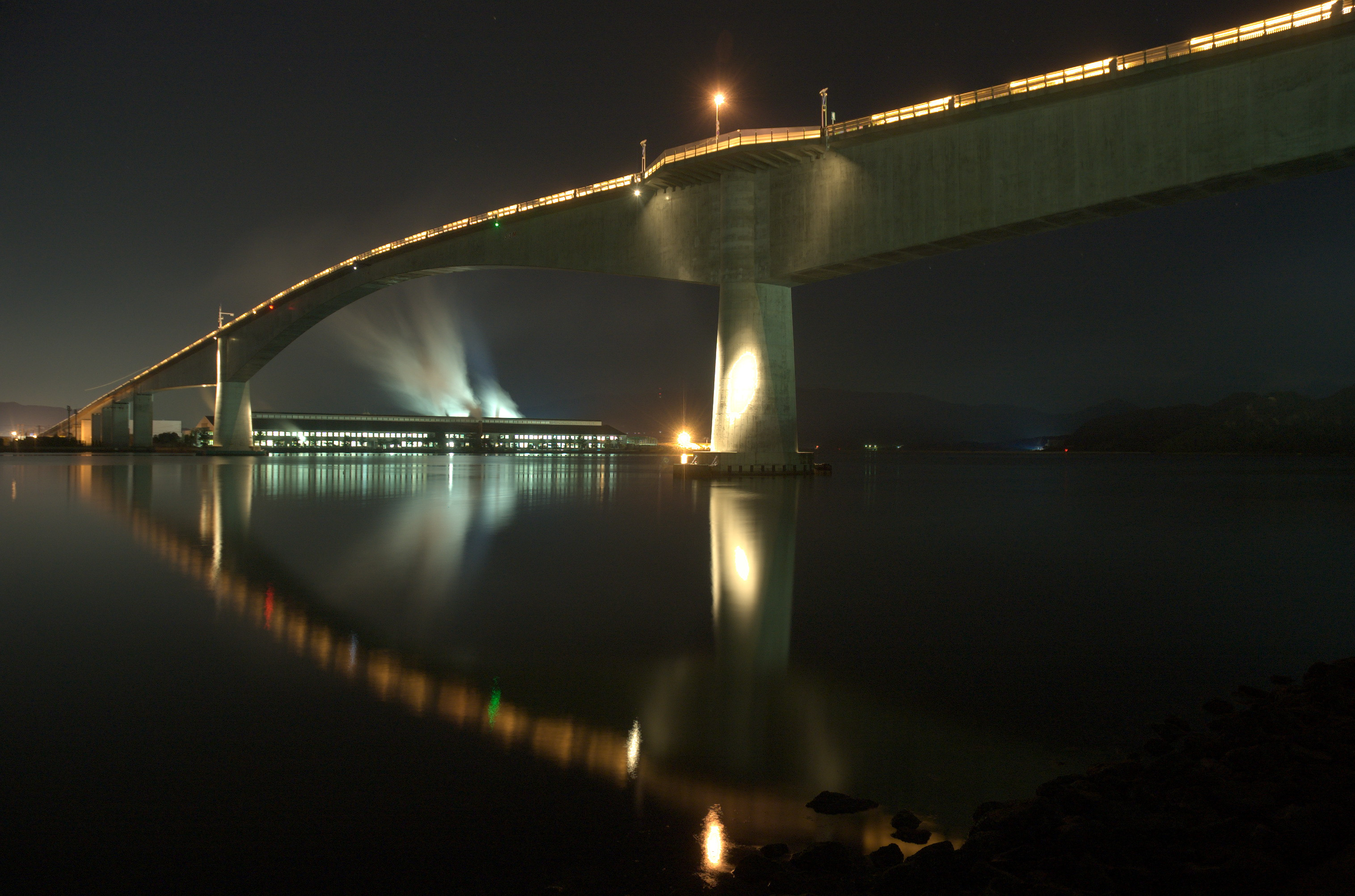 江島大橋 (e shima oo hashi) eshima oohashi